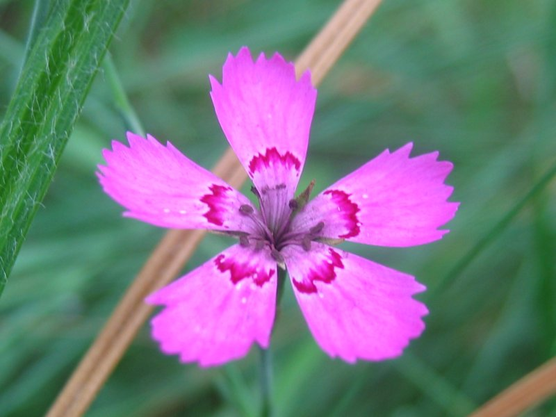 Heide-Nelke Dianthus deltoides, Müritz-Gebiet